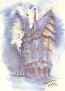 Robert Müller-Alsfeld: Im Morgenlicht - Rathaus Alsfeld 1976